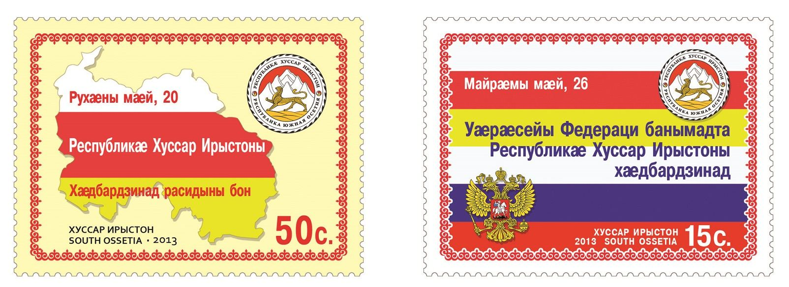 Первые марки вышедшие после признания РФ независимости РЮО